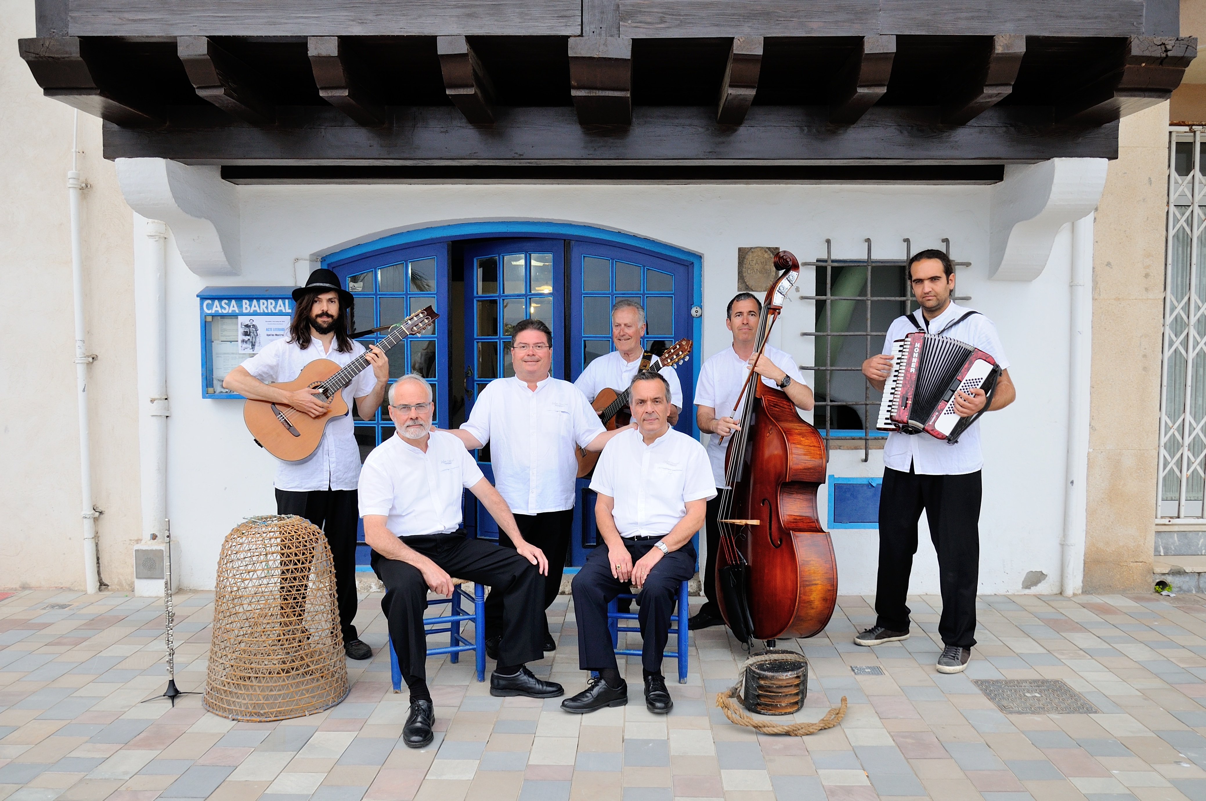 Fotografia a la façana de la casa Barral